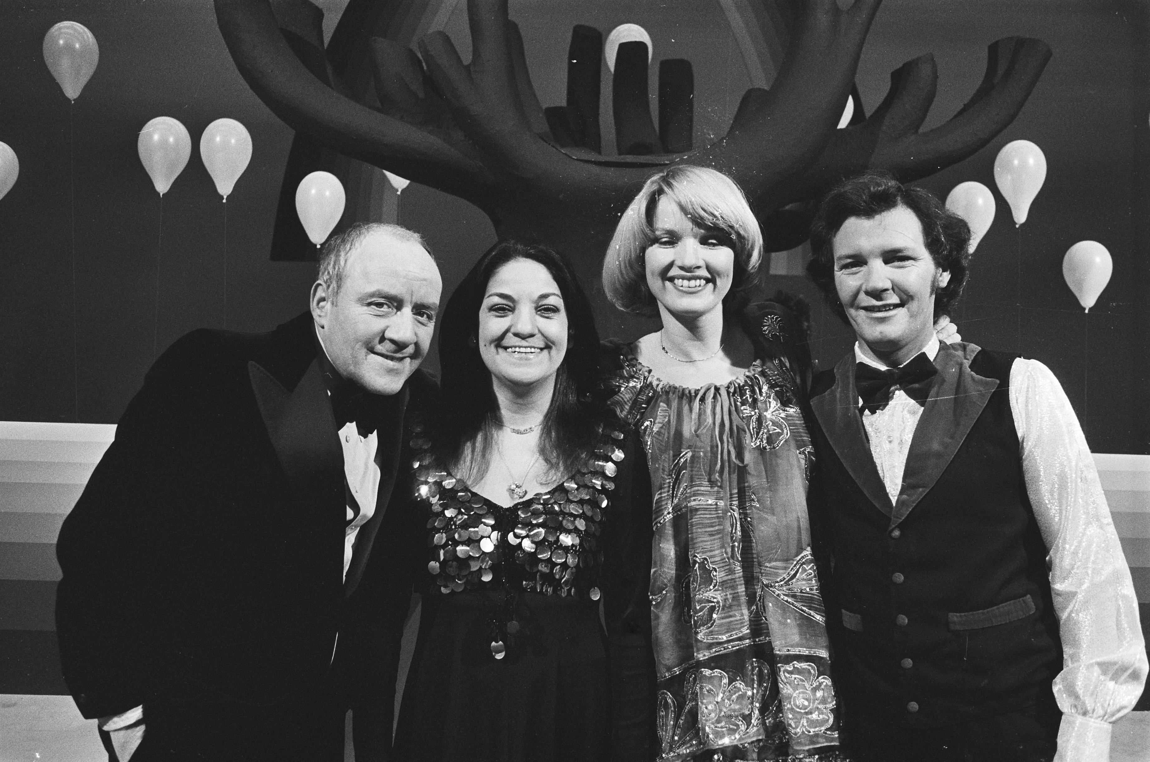 Collectie / Archief : Fotocollectie Anefo Reportage / Serie : [ onbekend ] Beschrijving : TROS-televisie; opnamen show met Martine Bijl (r) en Johnny Kraaijkamp (l) en Frida Boccara Datum : 1 februari 1978 Trefwoorden : OPNAMEN, shows Persoonsnaam : Bijl, Martine, Boccara, Frida, Kraaijkamp, Johnny (sr.) Fotograaf : Bogaerts, Rob / Anefo, [onbekend] Auteursrechthebbende : Nationaal Archief Materiaalsoort : Negatief (zwart/wit) Nummer archiefinventaris : bekijk toegang 2.24.01.05 Bestanddeelnummer : 929-5527